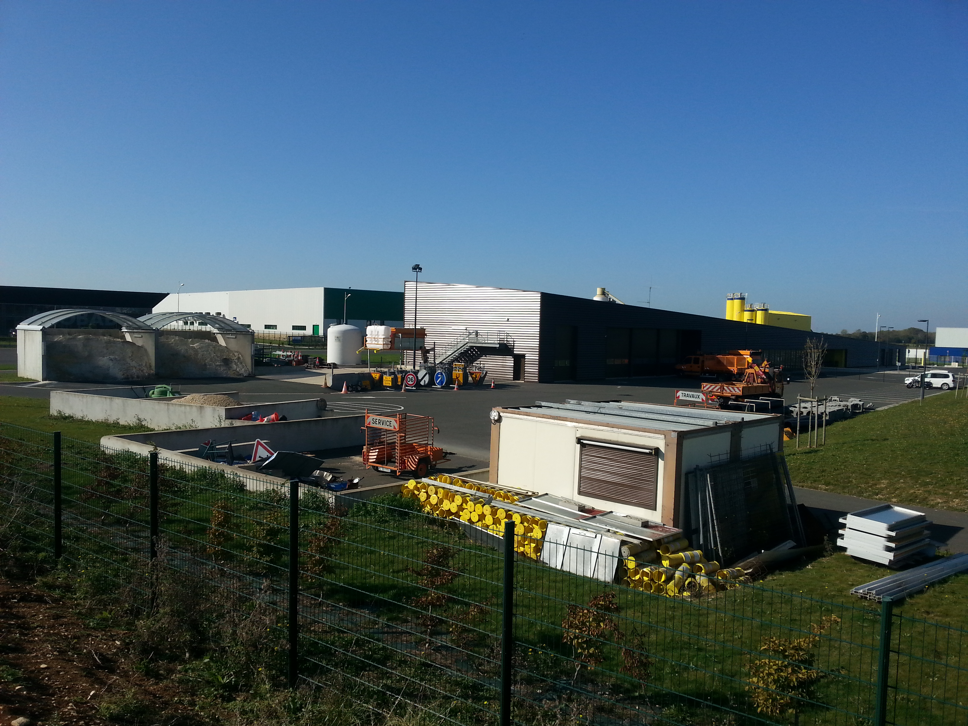 Déols (36) : Le point d'appui de Châteauroux.